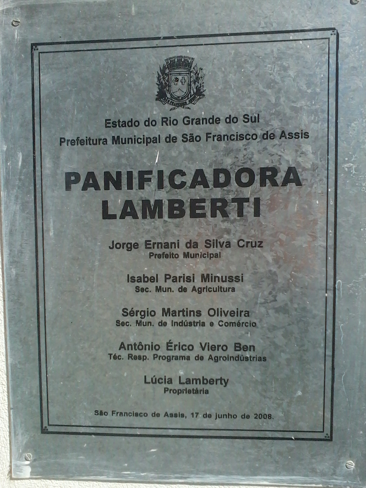 Placa da Agroindustria Panificadora Lambert